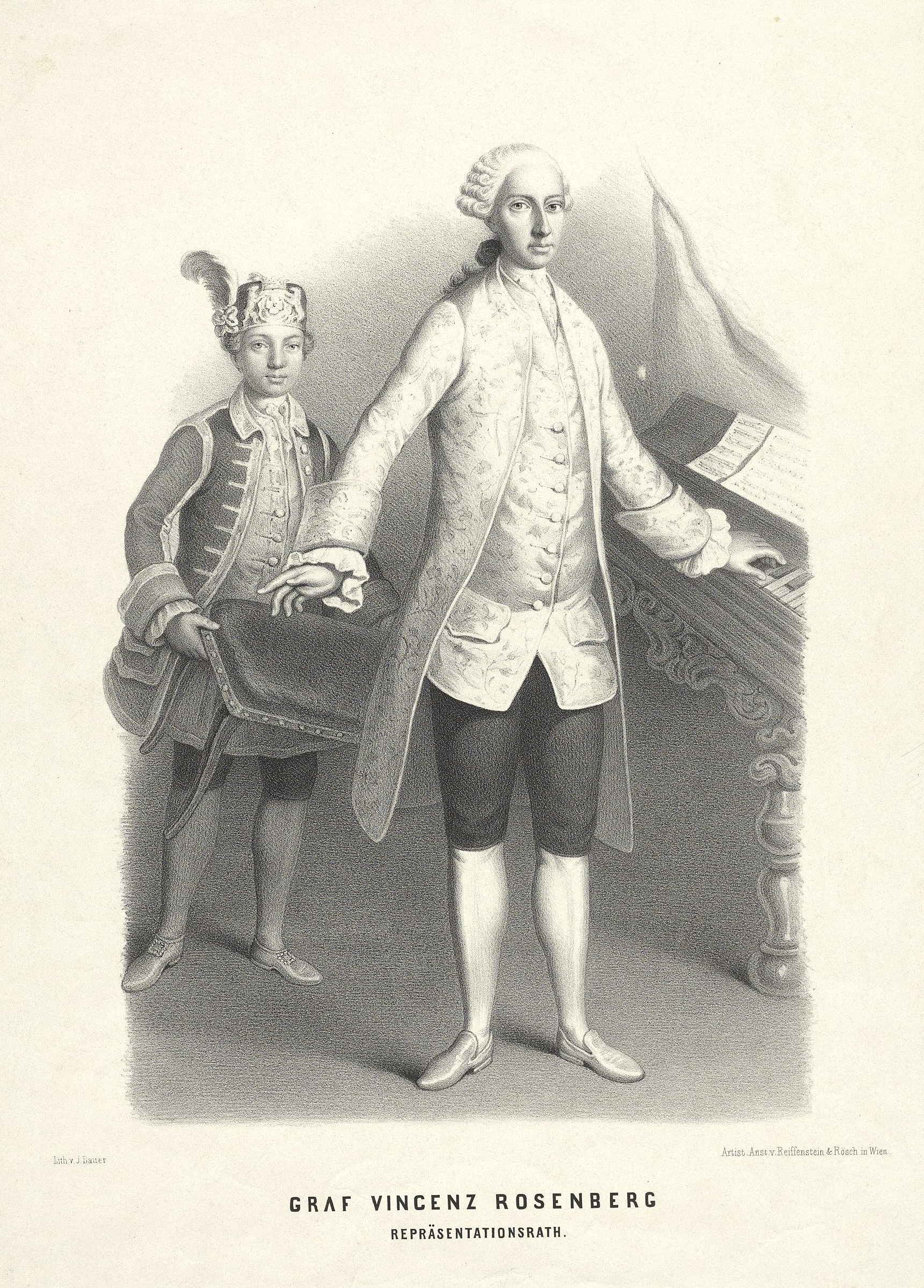 Vinzenz Graf Orsini und Rosenberg (1722–1794) Wien, Österreichische Nationalbibliothek, Bildarchiv und Grafiksammlung, Porträtsammlung, Inventar-Nr. PORT_00025234_01